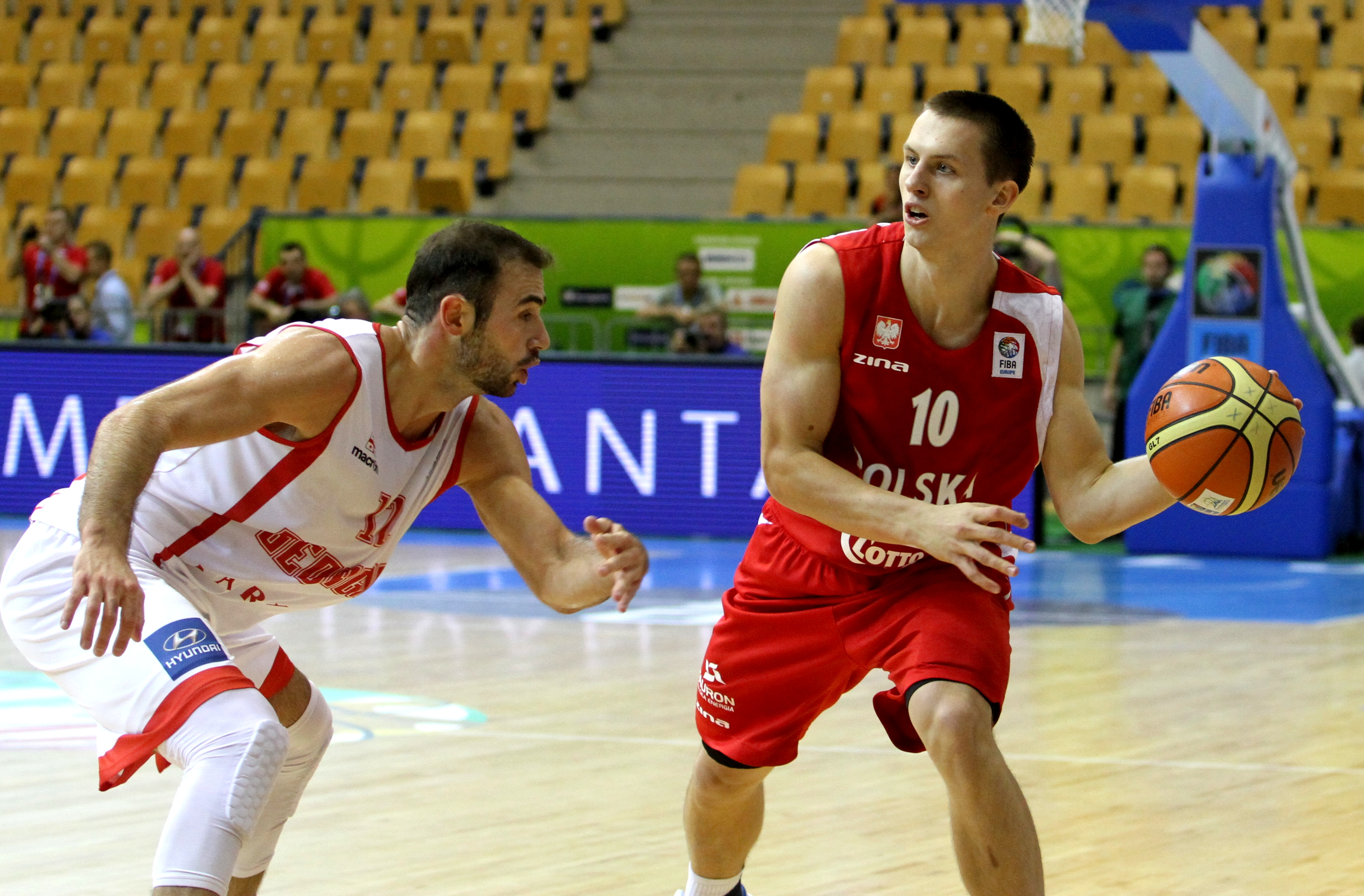 Reprezentacja Polski koszykarzy z 2013 roku. Mateusz Ponitka